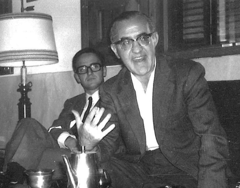 D Jesús Arellano, fue el primer director del Colegio Mayor Guadaira (Sevilla), por los años 1940; treinta años después visita el Mayor en su nueva sede en la avenida de la Palmera.